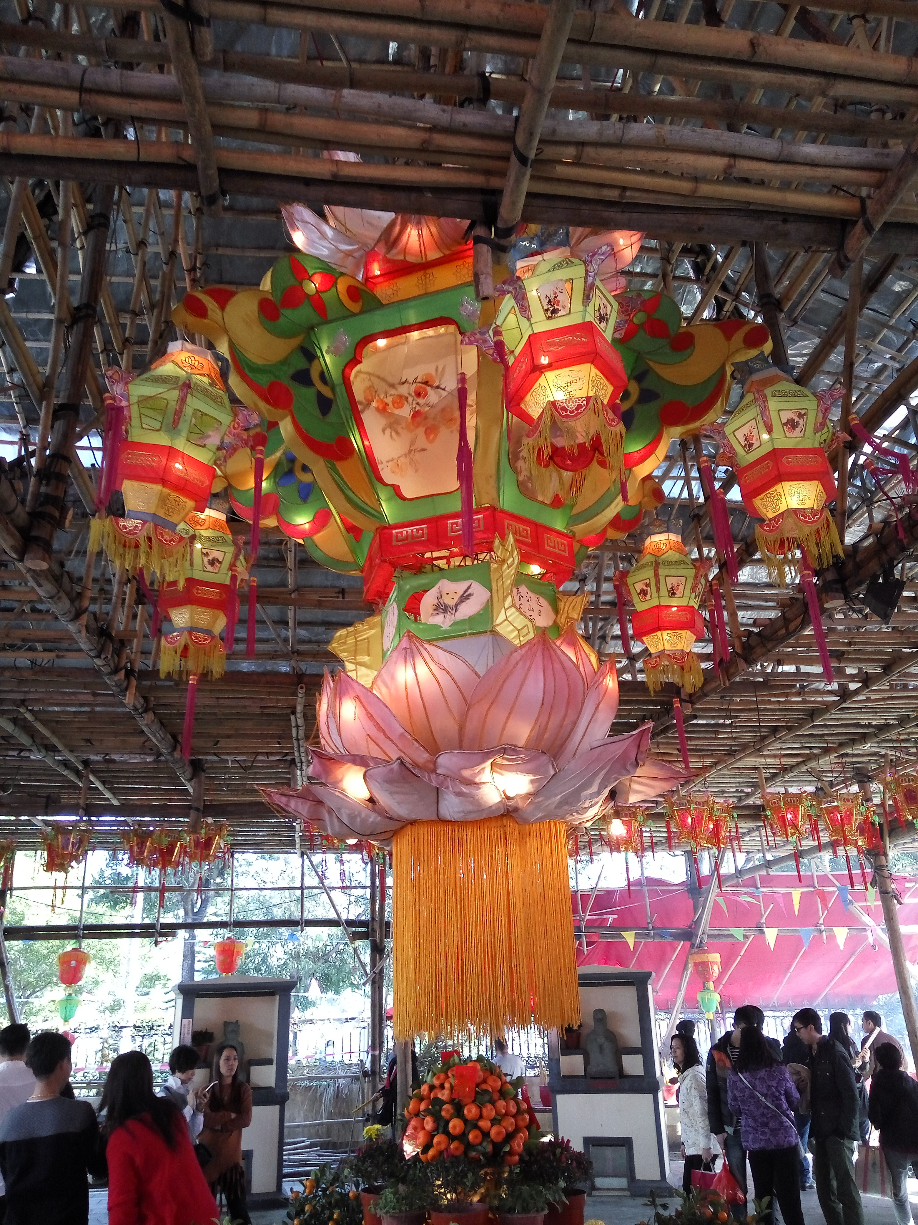 中文（香港）: 林村香港許願的燈棚